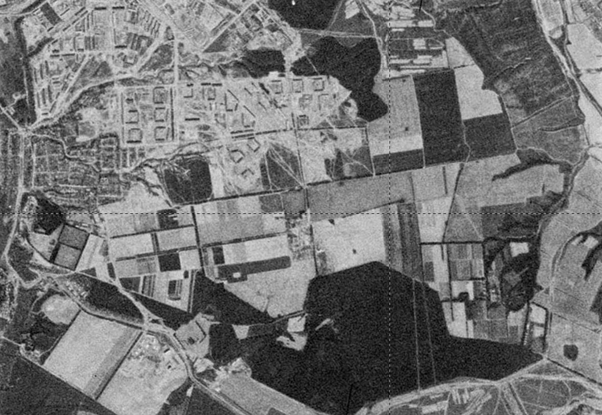 Казань. Застройка жилого района Горки со спутникового снимка (1974)